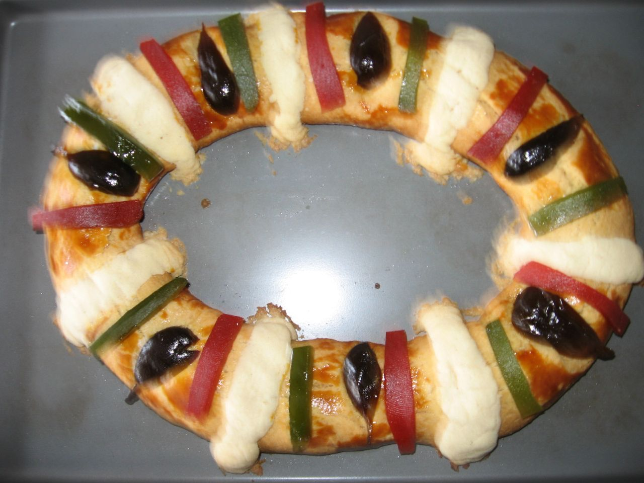 Rosca de reyes - a Mexican fruit cake